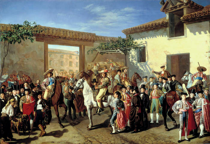 Manuel Castellano, Patio de la cuadra de caballos de la plaza de toros, antes de una corrida, 1853, óleo sobre lienzo, 168 x 245 cm.